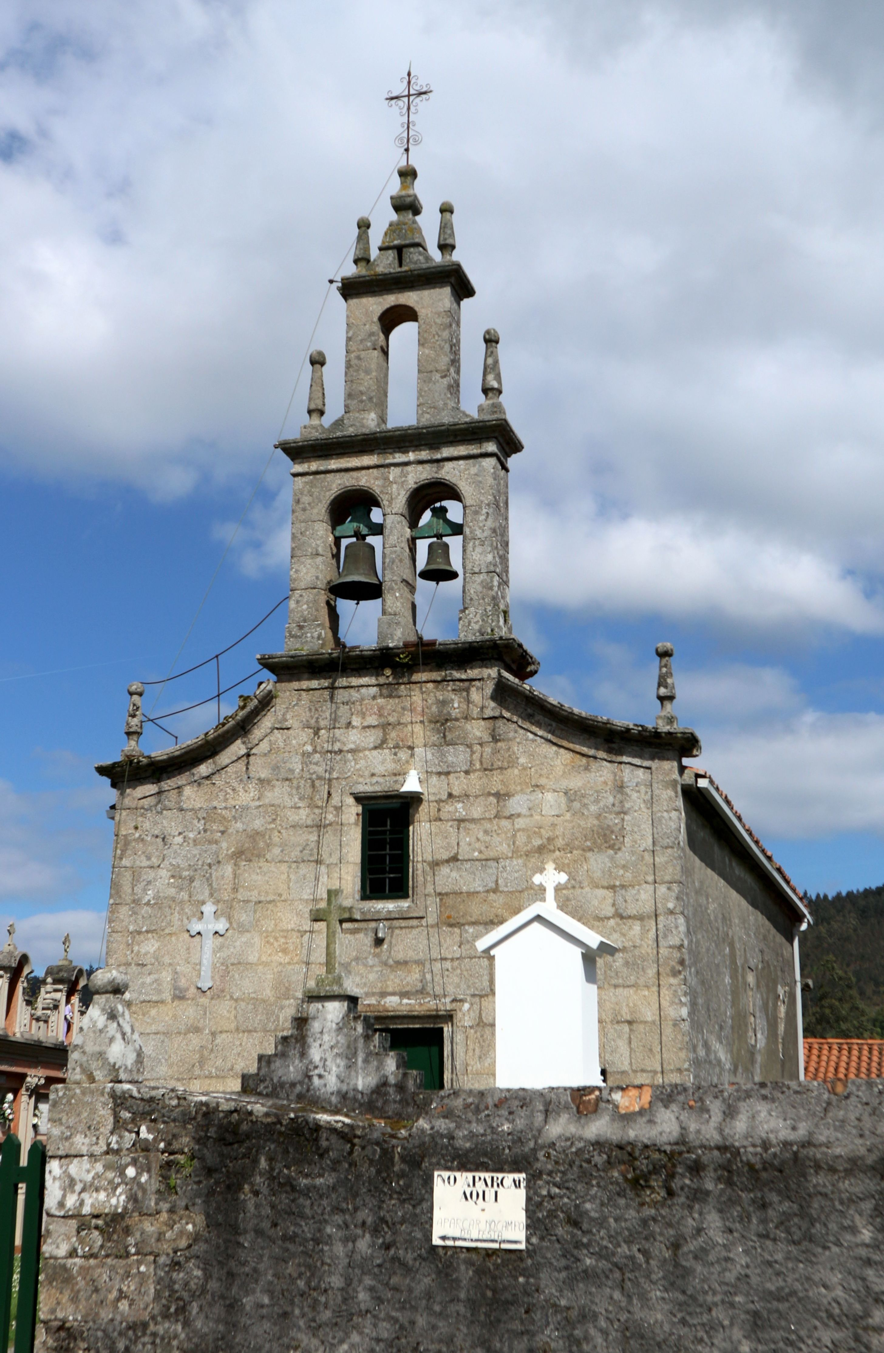 Igrexa de Santa María da Regueira. A Regueira, Oza-Cesuras